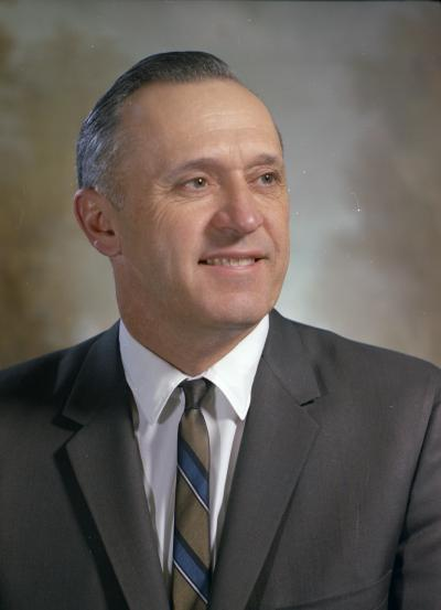 Representative Otto Amen, 1967